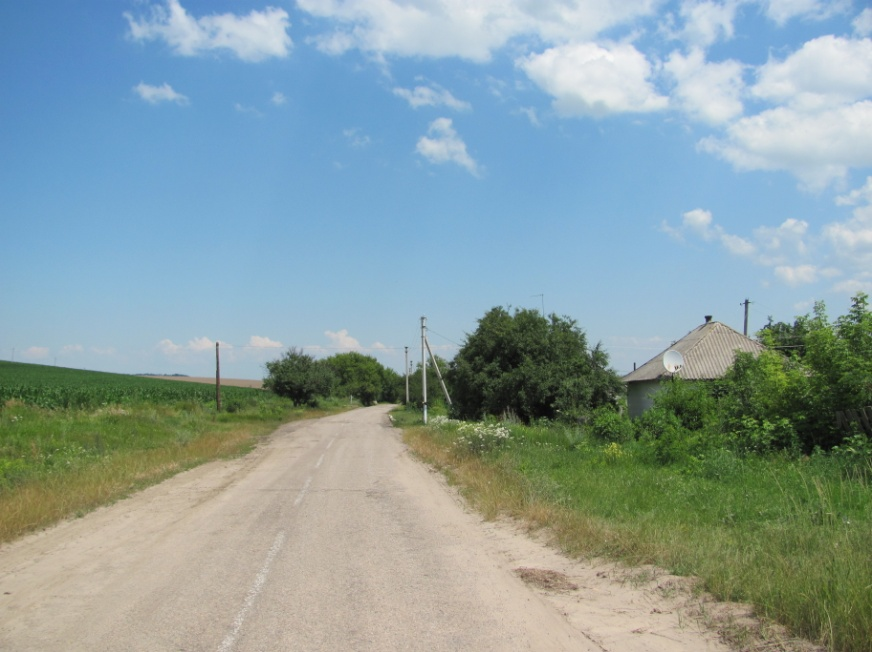 На польовому виїзді 2016-го року